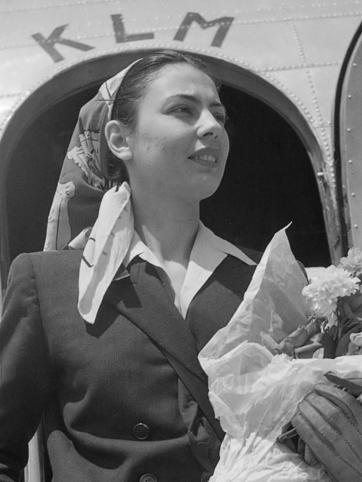 Vertrek filmster Marie Déa, Franse actrice 25 juni 1946